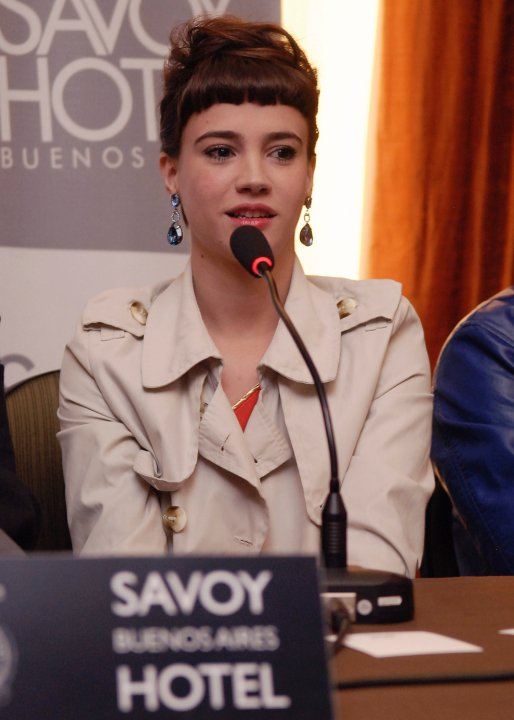 Celeste Cid en la presentación de la película Eva & Lola.